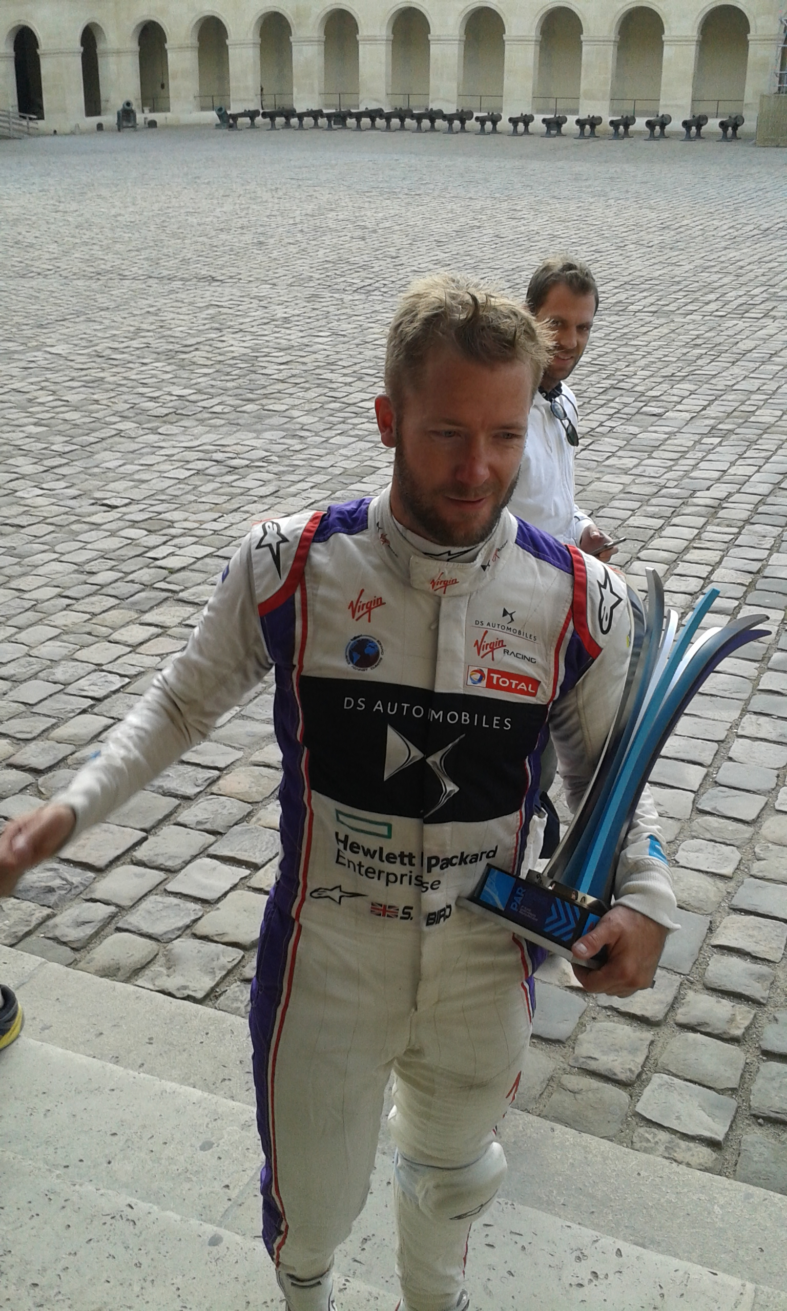 Sam Bird mit dem Pokal für den dritten Platz auf dem Weg zur Pressekonferenz beim Paris E-Prix 2018